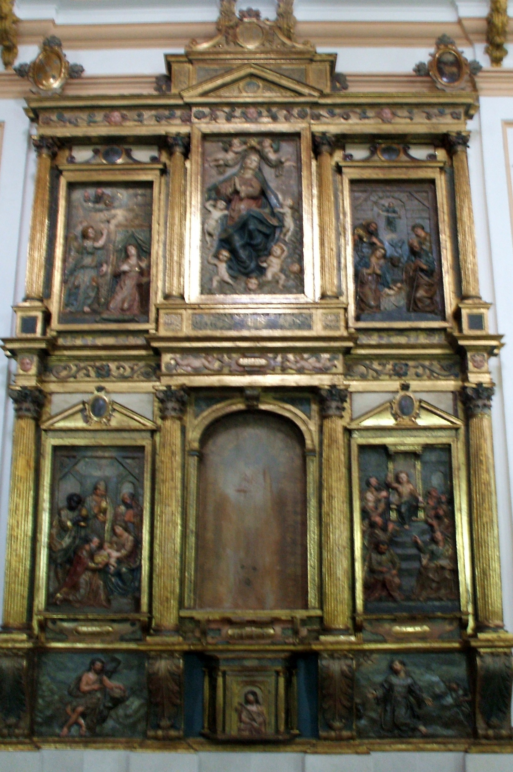 Retablo de Pedro de Bolduque en la iglesia conventual de la Concepción, de Cuélar